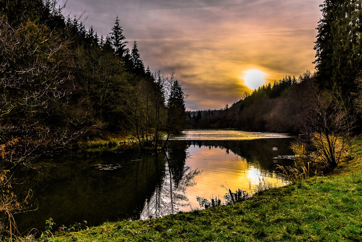 Der Wispersee in Heidenrod. Foto Ulrich Eschenauer